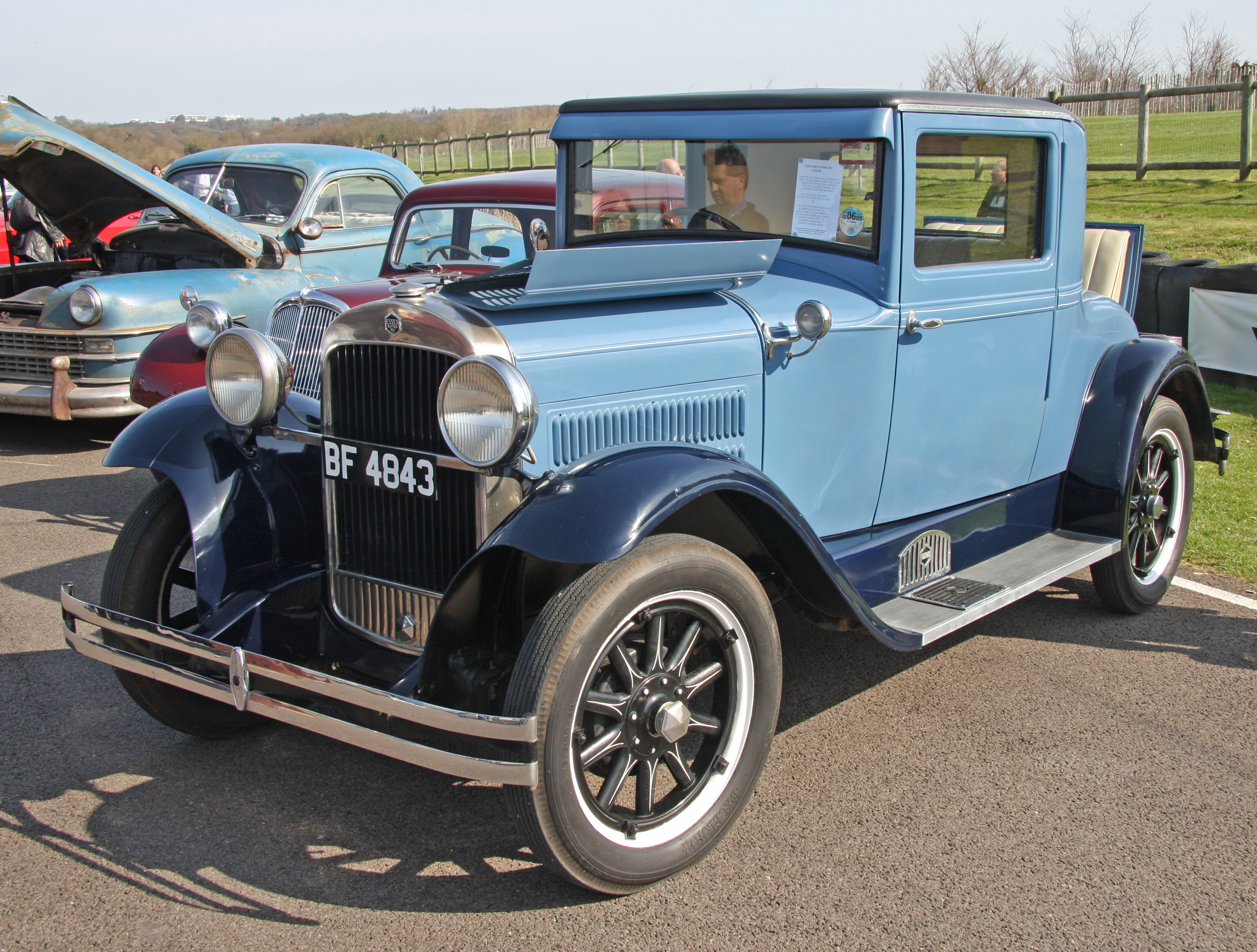 1929 Essex Super Six Coupé